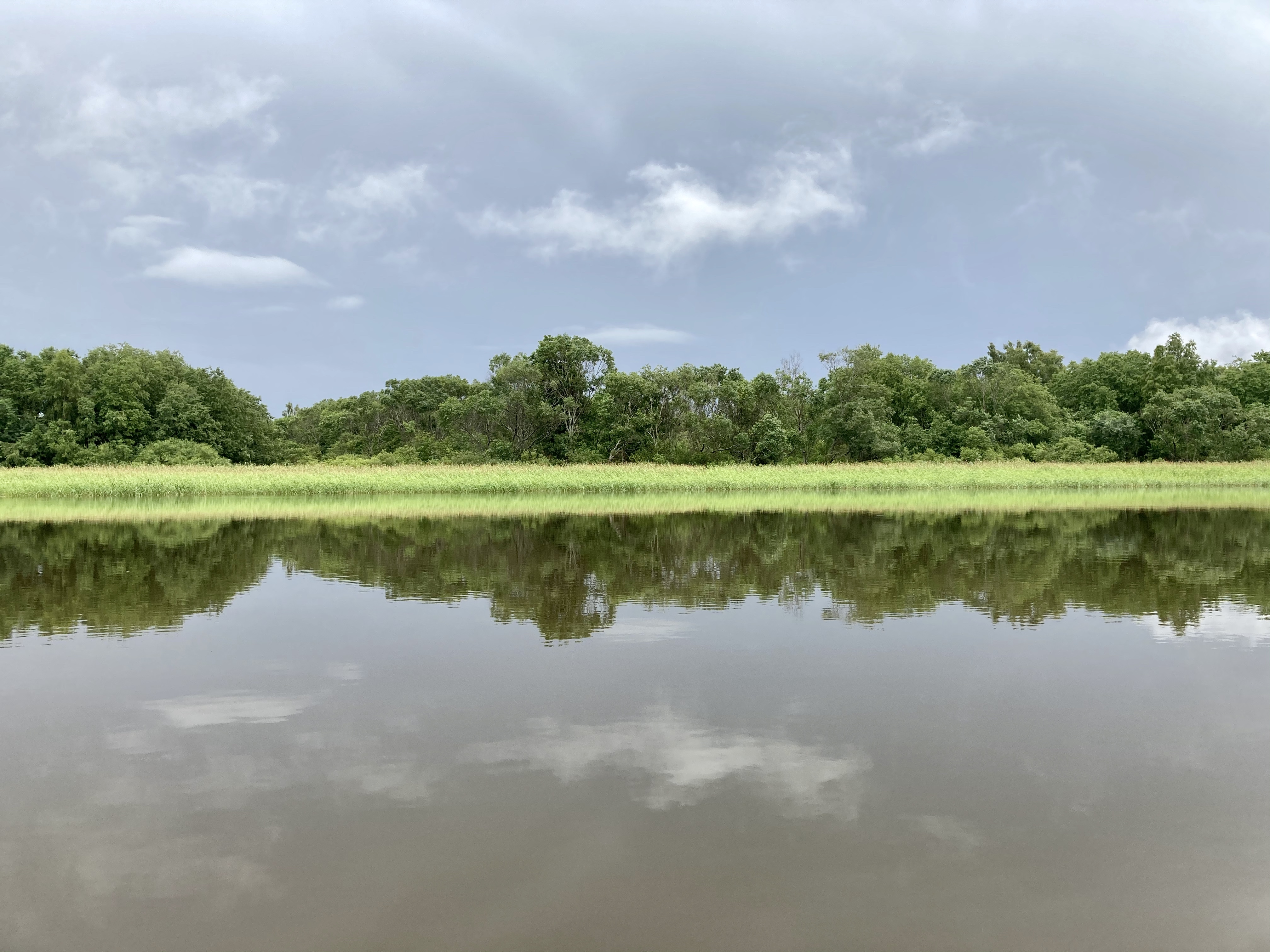 Kokemäenjoki, Pori